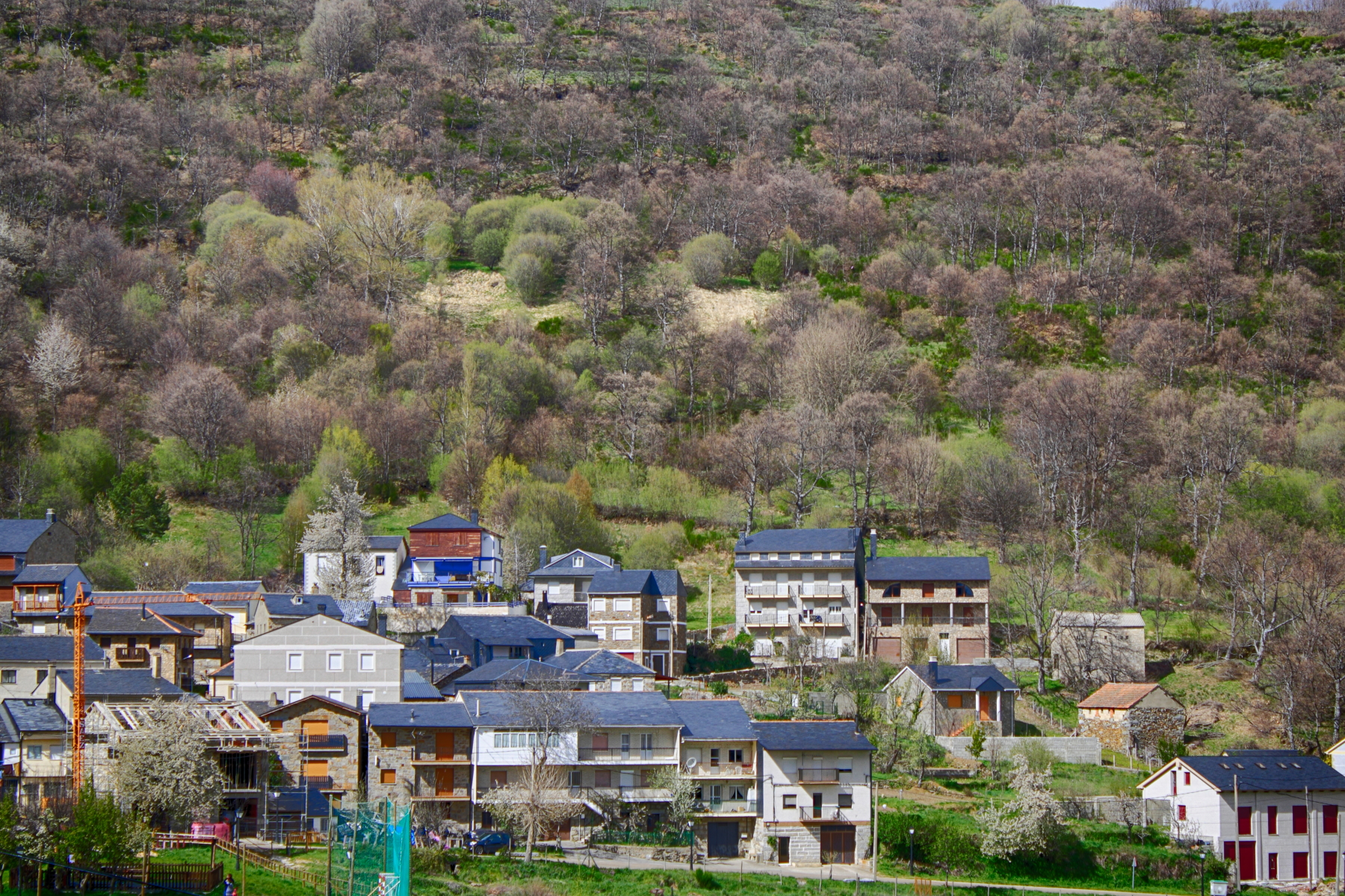 San Martín de Castañeda, municipio de Galende Provincia de Zamora Castilla y León España